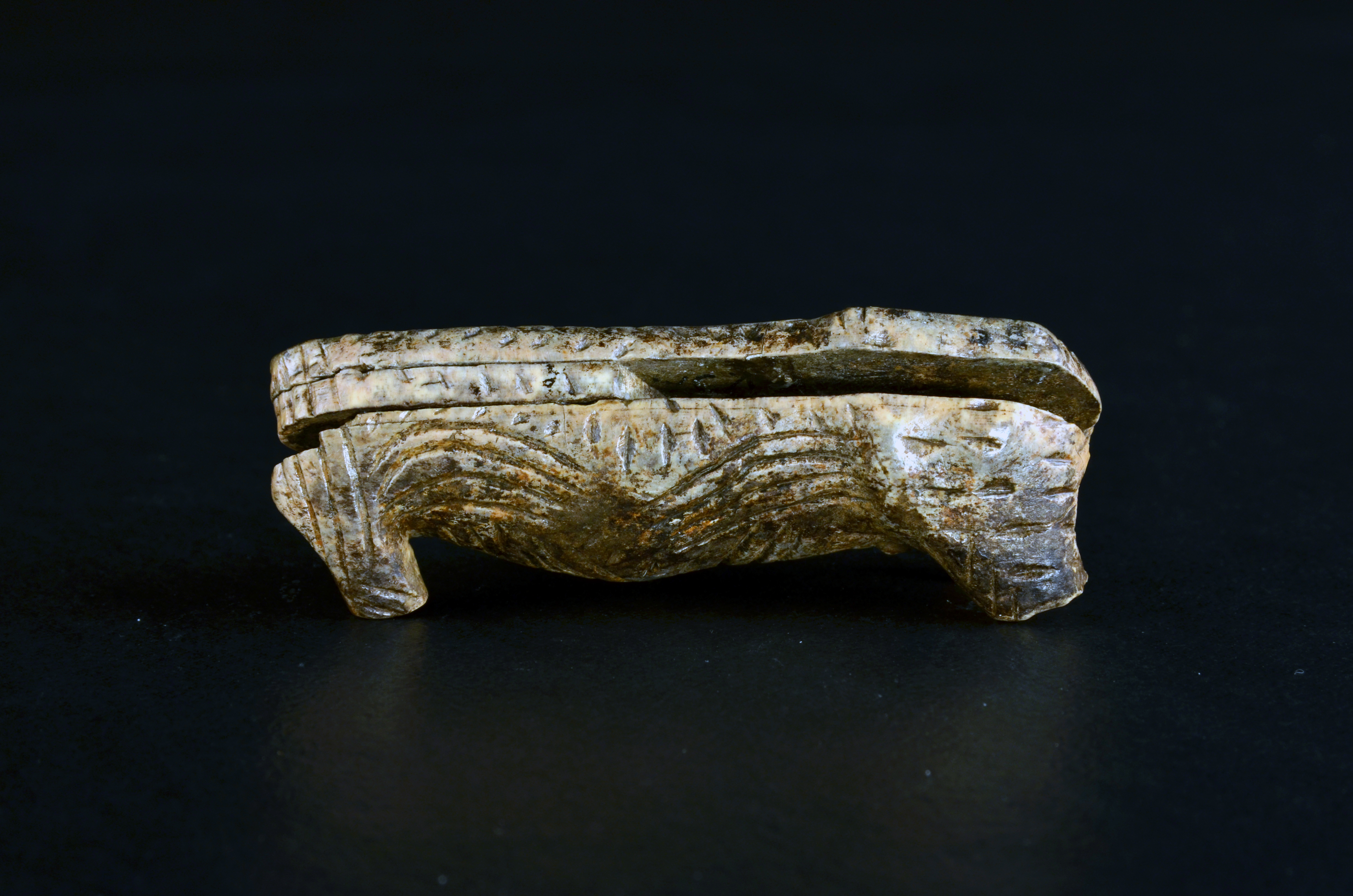 Welle